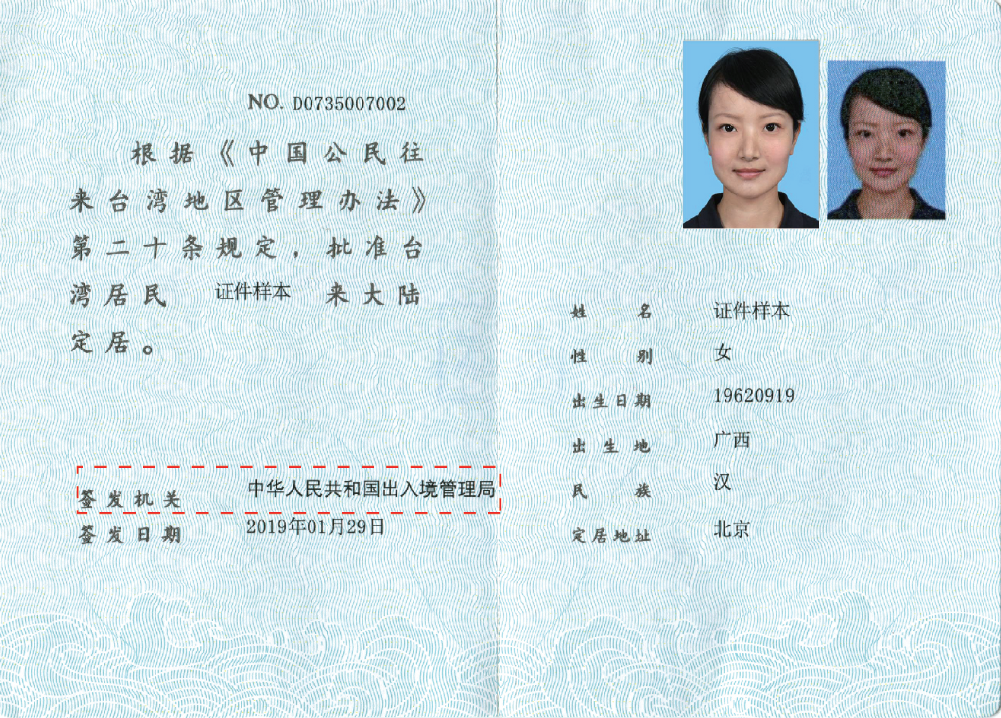 中文（中国大陆）: 台湾居民申请来大陆定居后签发出的一种证件